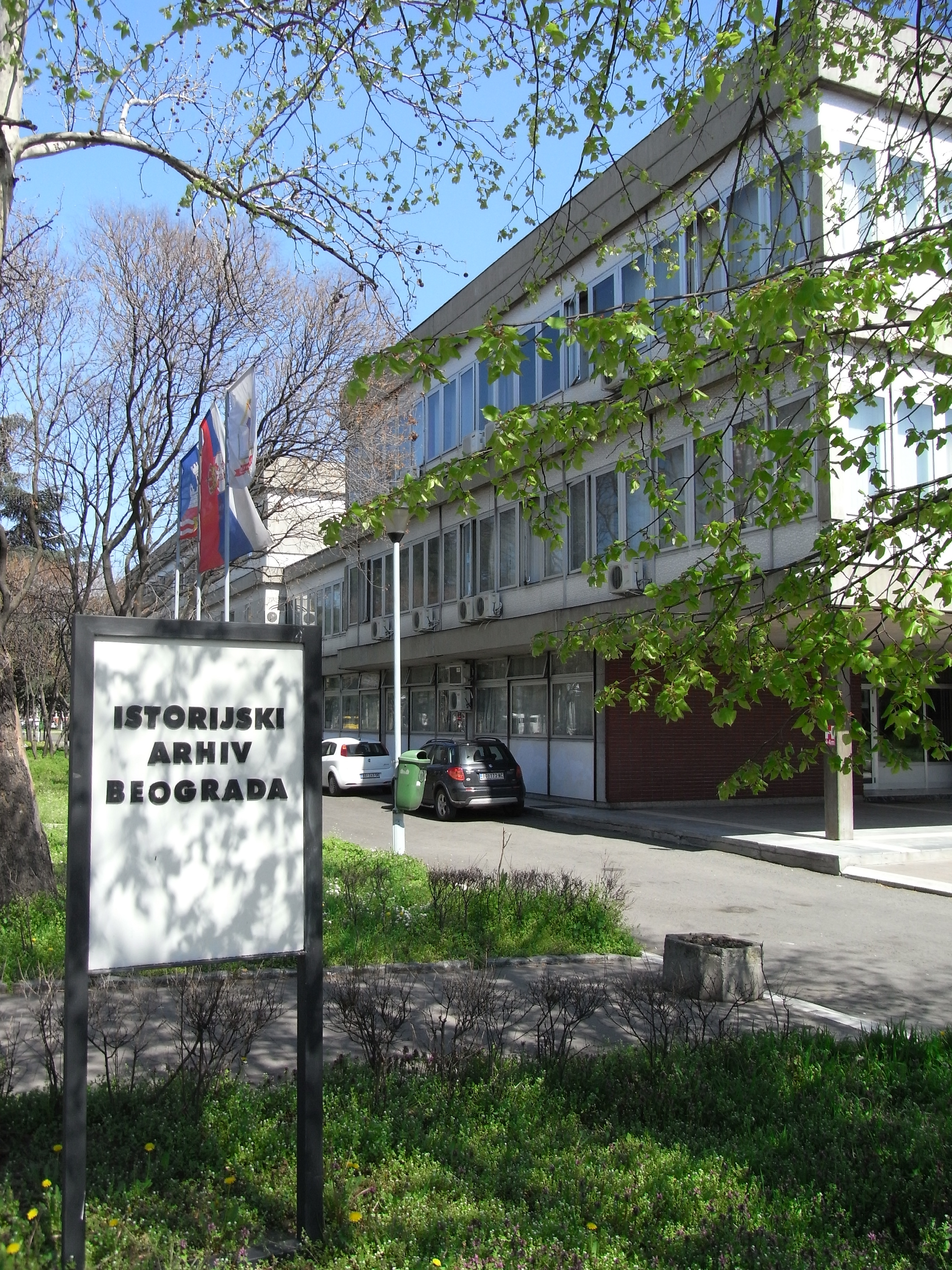 Archives de Belgrade, Serbie